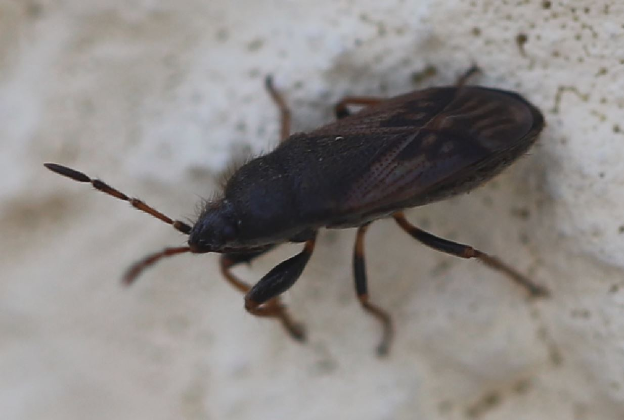 Wanze Megalonotus sabulicola am 17. Juli 2020 an einer Hauswand